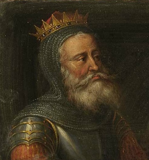 Détail d'un portrait de Godefroy Ier et de son épouse.